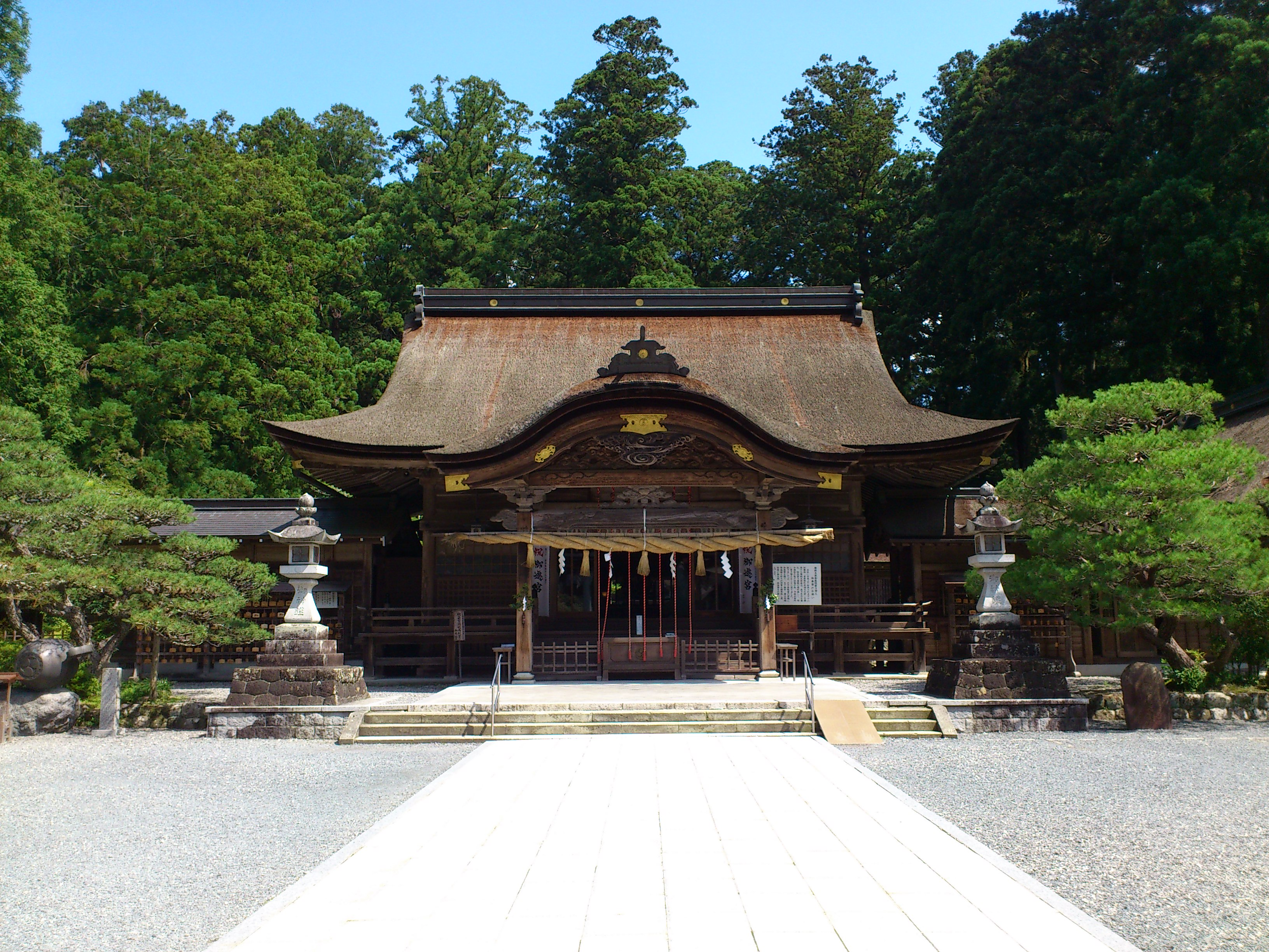 遠江国一之宮小国神社 拝殿